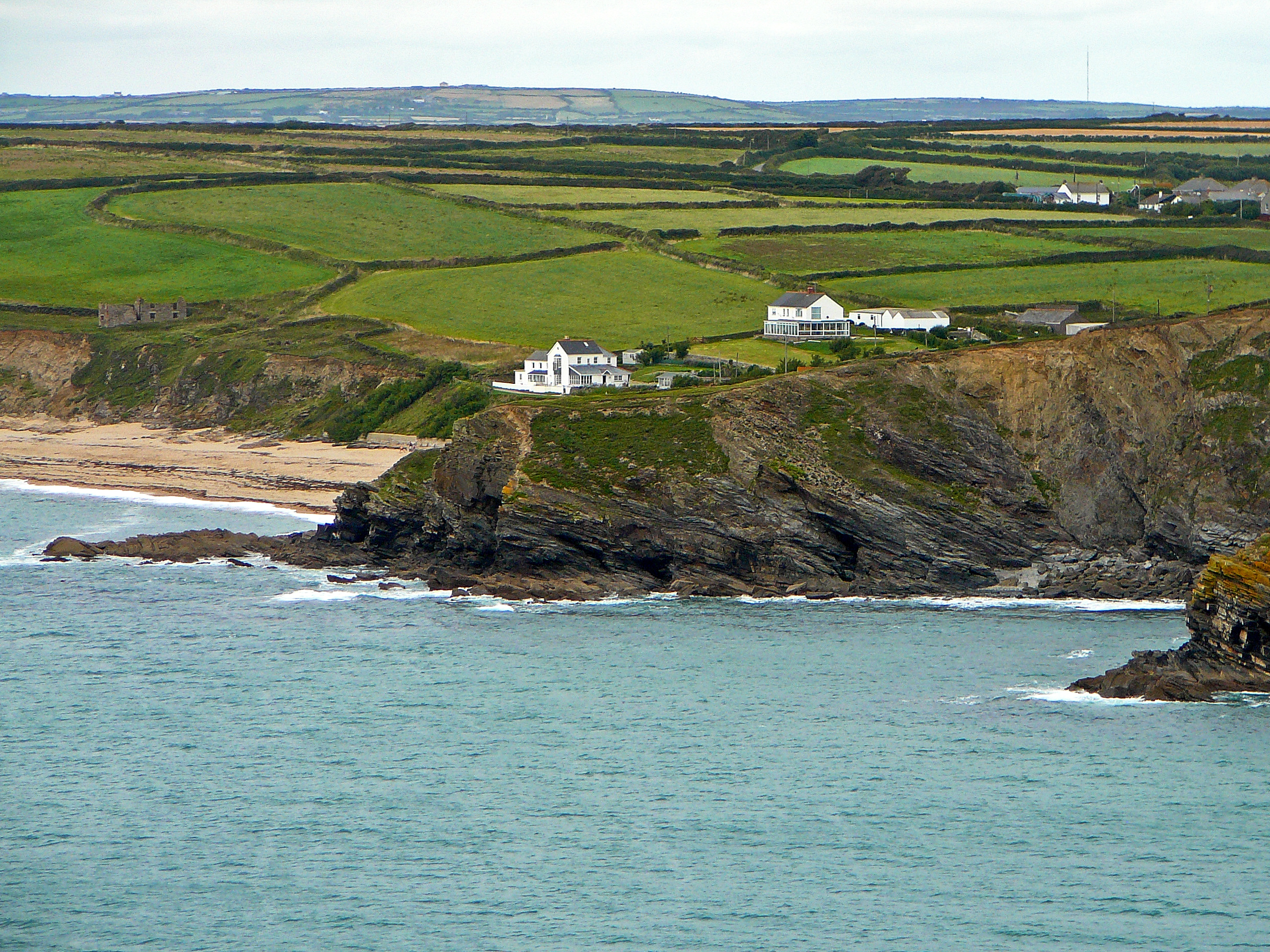 near Gunwalloe, Cornwall